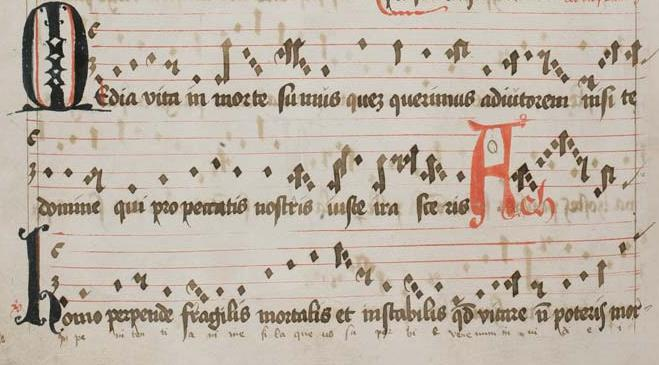 Antiphon "Media vita in morte sumus"